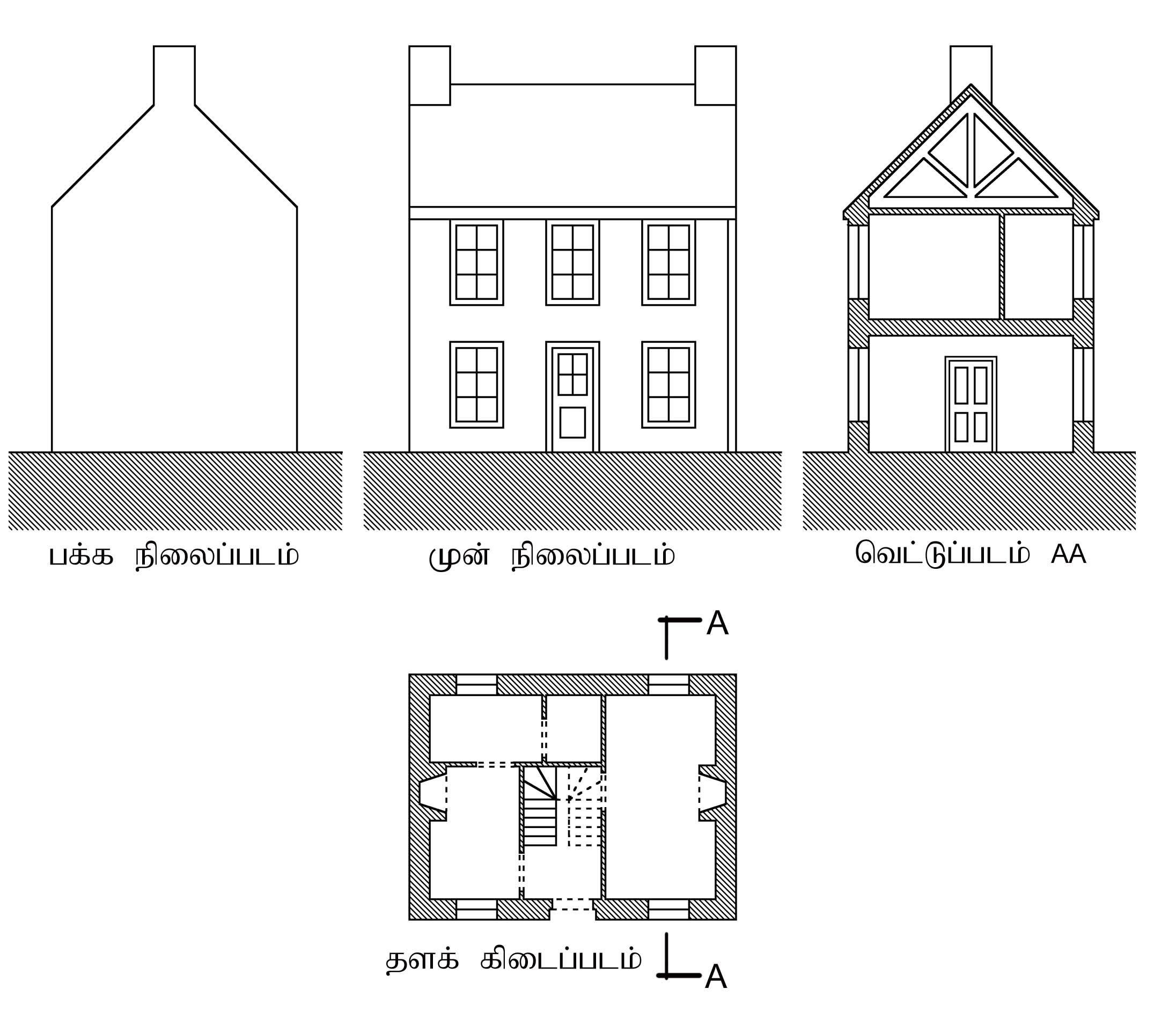 Modified an image fron Commons. File:Architectural drawing 001.png